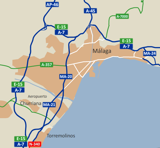 Hiperronda de Malaga